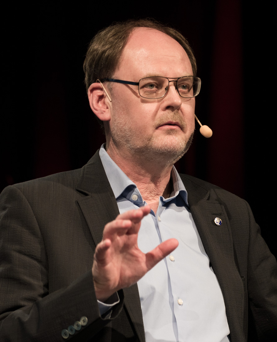 Clas Svahn på Källkritikens dag i Kulturhuset Stadsteatern i Stockholm den 13 mars 2017.